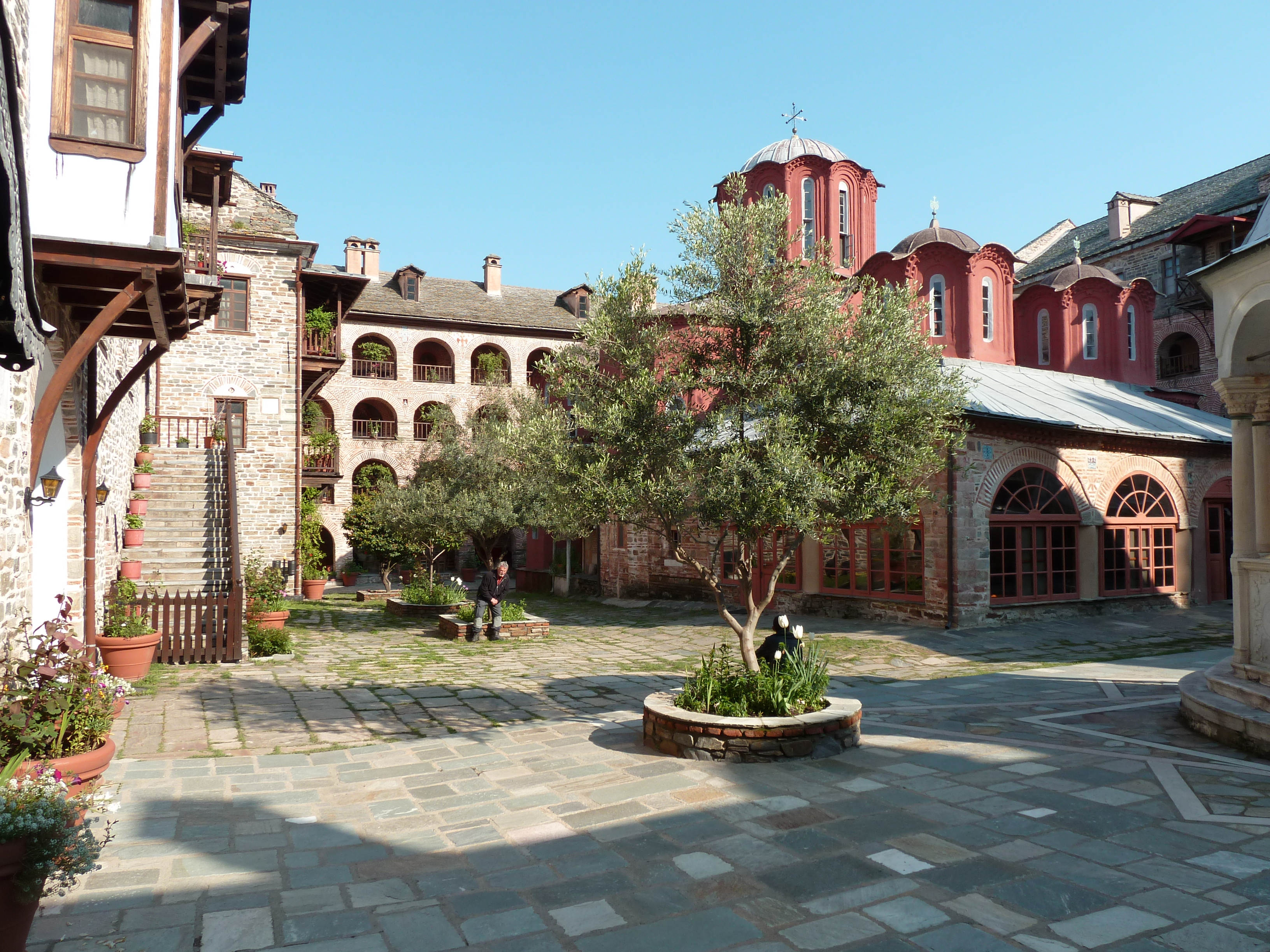 Cour intérieure du monastère de Koutloumousiou (Mont Athos)